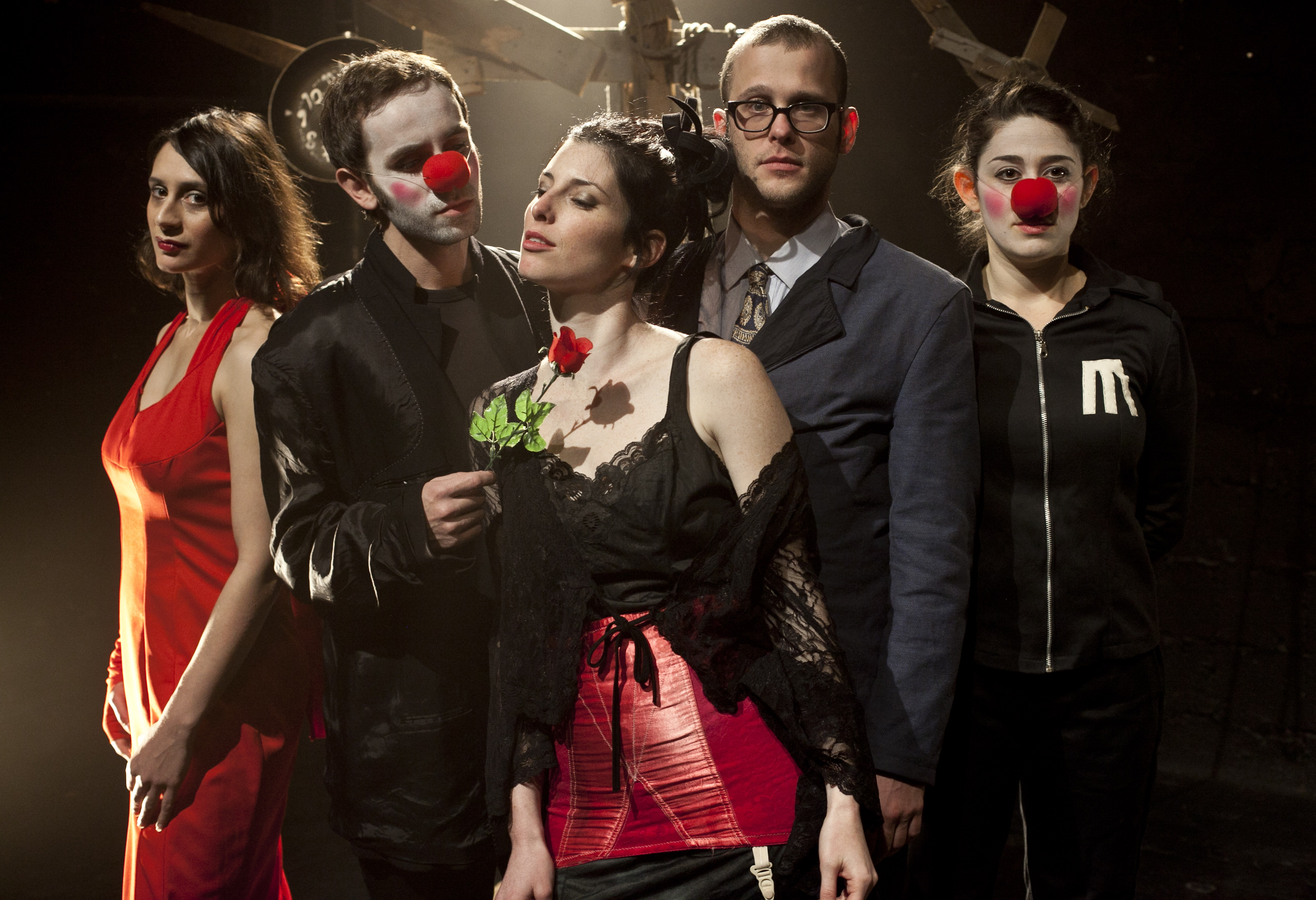 מי שם